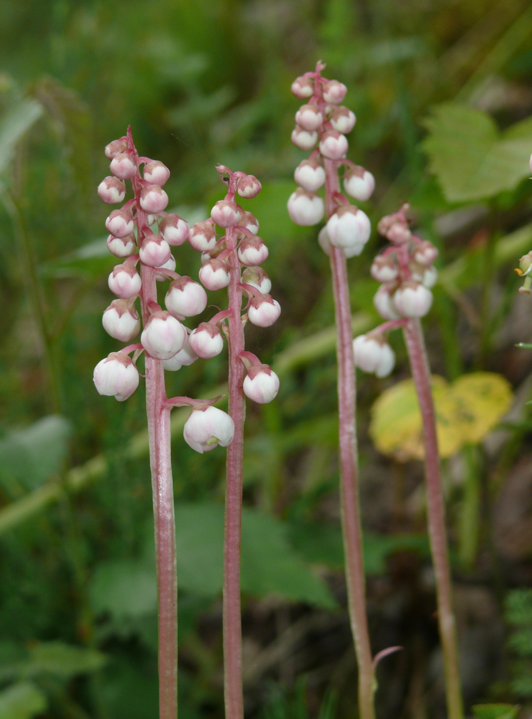 Pyrola minor, Virngrund